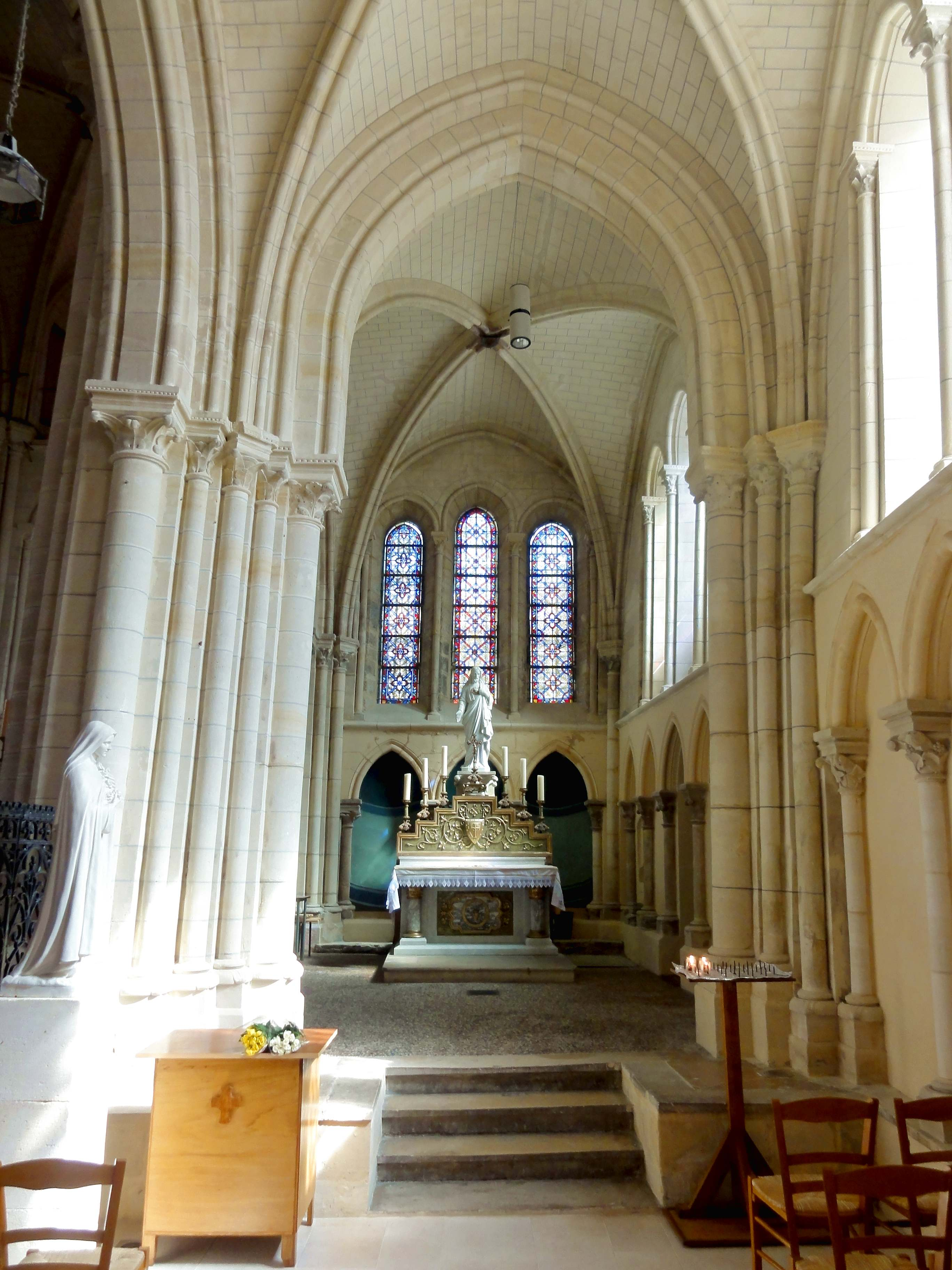 Intérieur de l'église - voir titre.